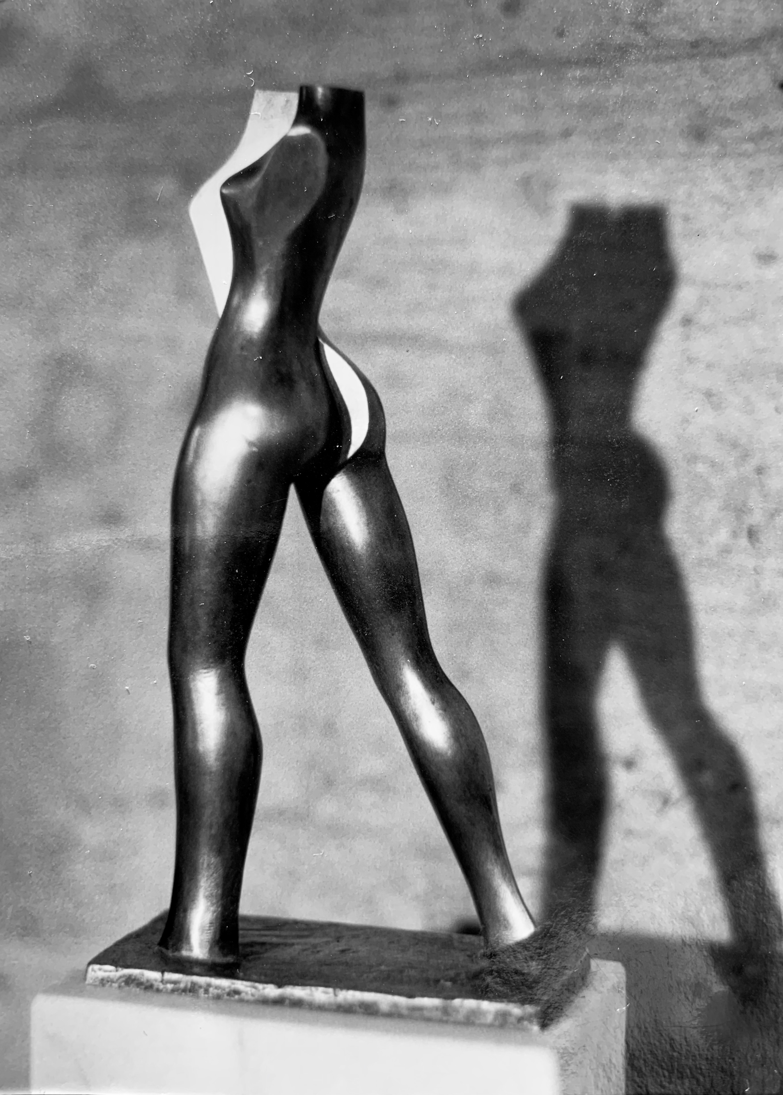 Die Zeit - Messing, 24cm, 1984